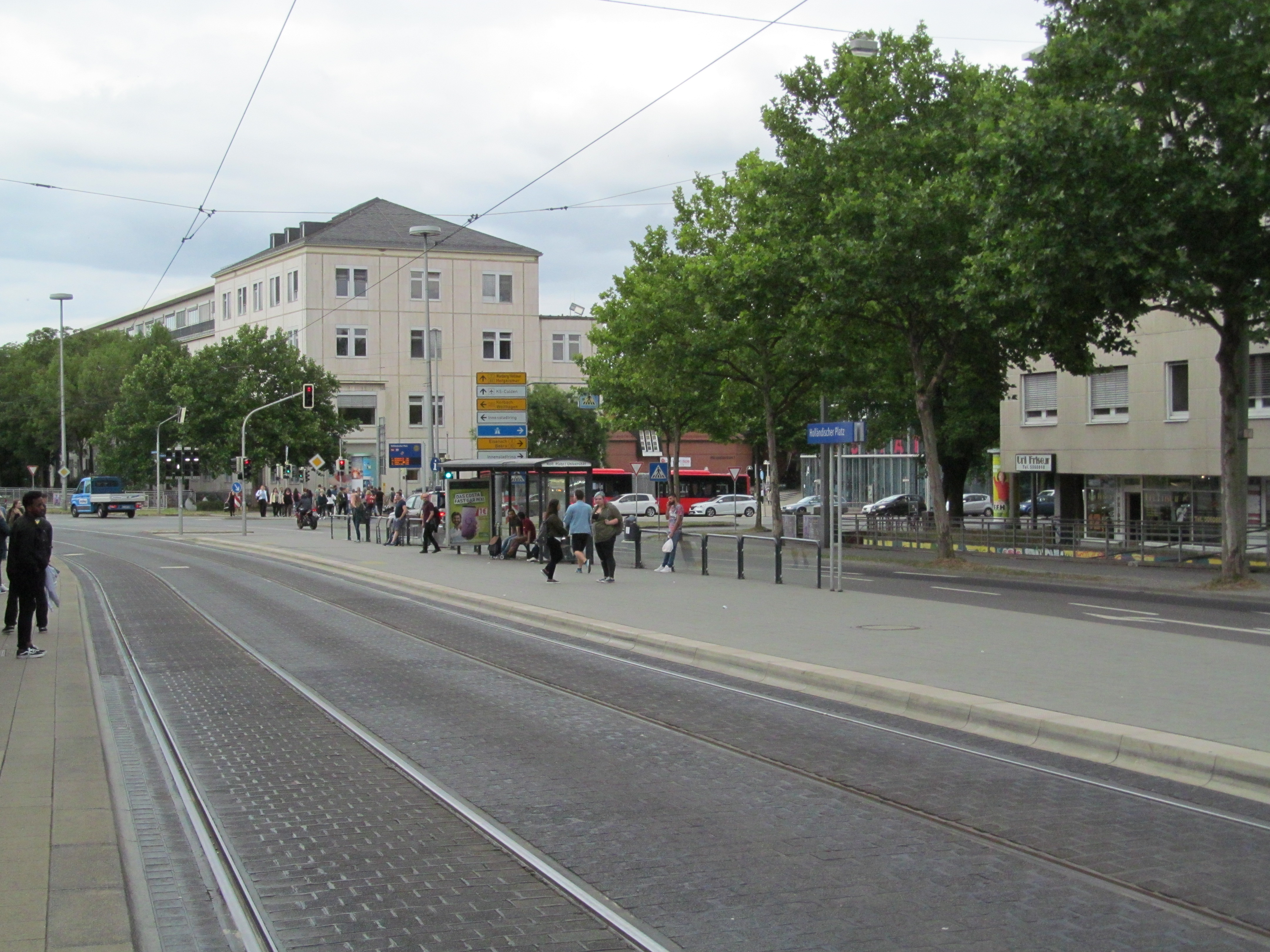 die Tramhaltestelle am Holländischen Platz für Fahrten in Richtung Holländische Straße, hier halten auch die Linienbusse